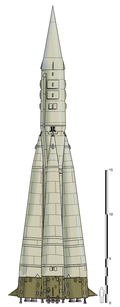 Prototipo del misil soviético R-7